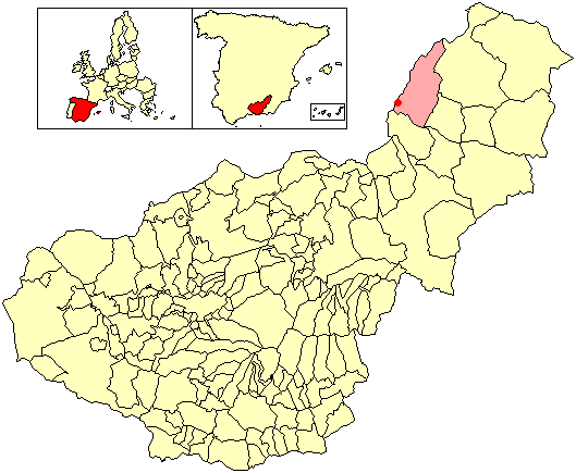 Situación de la localidad de Tala Bartolo (en el municipio de Castril) respecto a la provincia de Granada, en España.